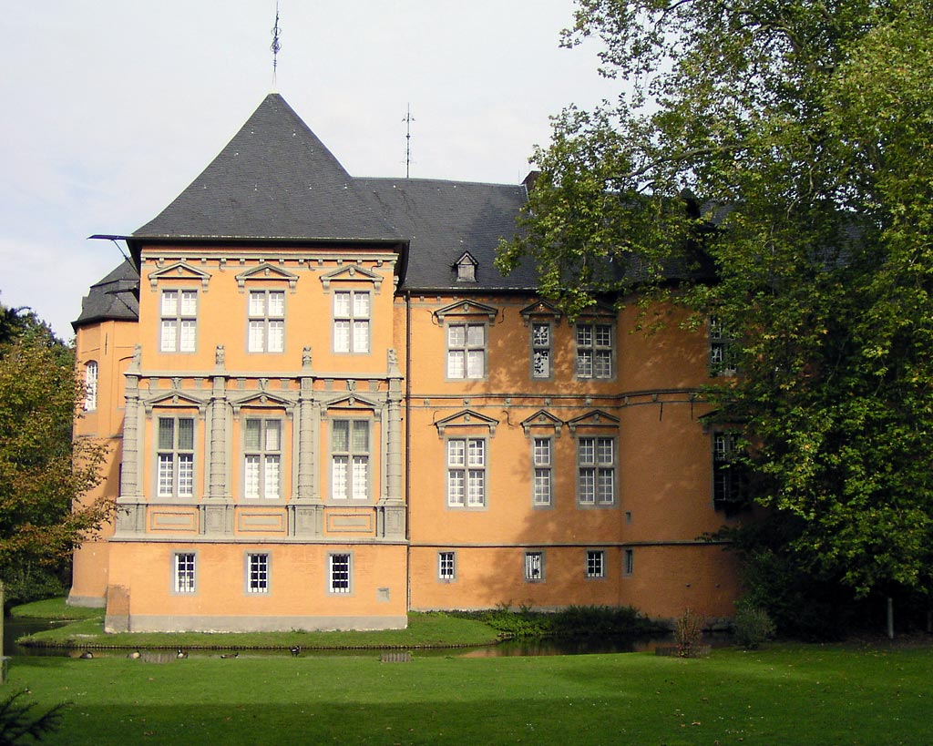 Die Südseite des Herrenhauses von Schloss Rheydt.